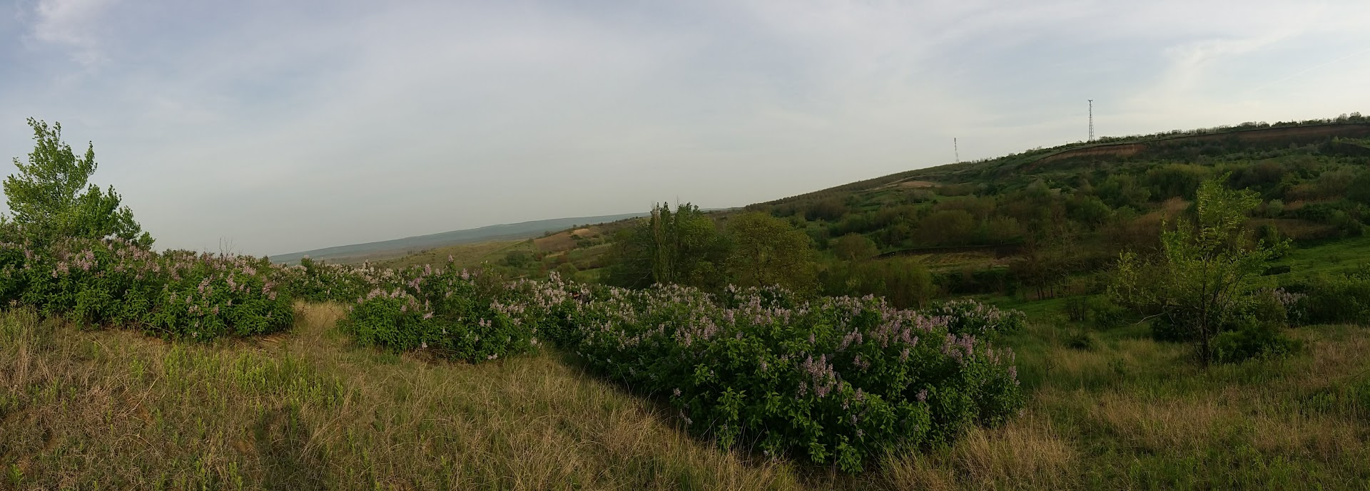 Хаджимус